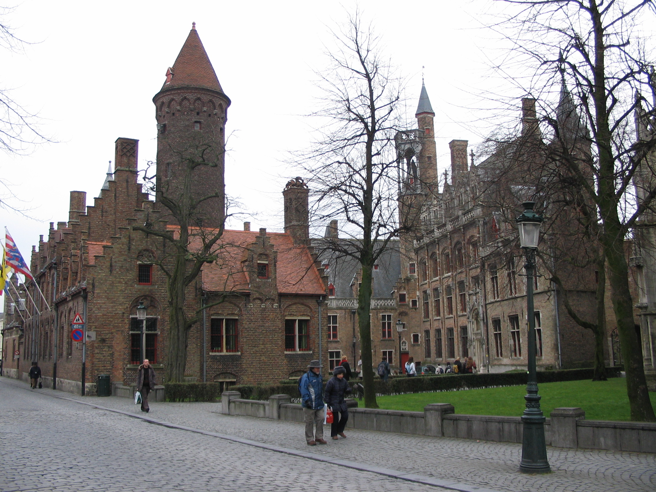 Gruuthuse, Bruges (Belgique).